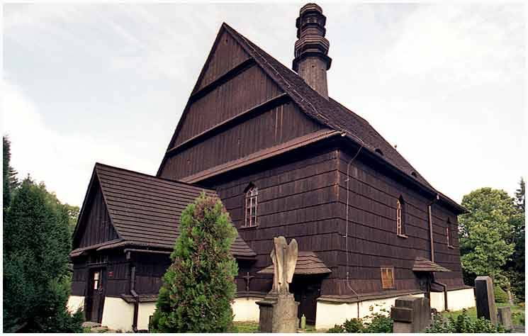 Kostel sv. Petra a Pavla (Liberk), Liberk